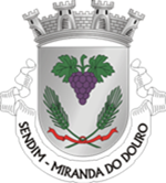 Brasão de Sendim(Portugal) 150px